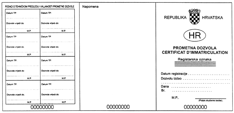 Prometna dozvola prednja